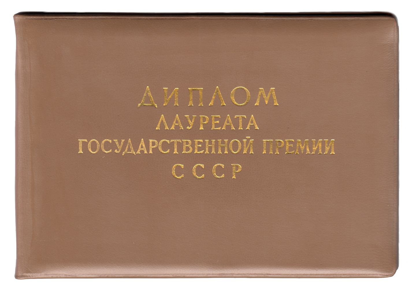 Свидетельство лауреата государственной премии СССР